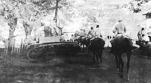 26. Kavallerie auf dem Rückzug nach Pozorrubio, Philippinen, 1941)